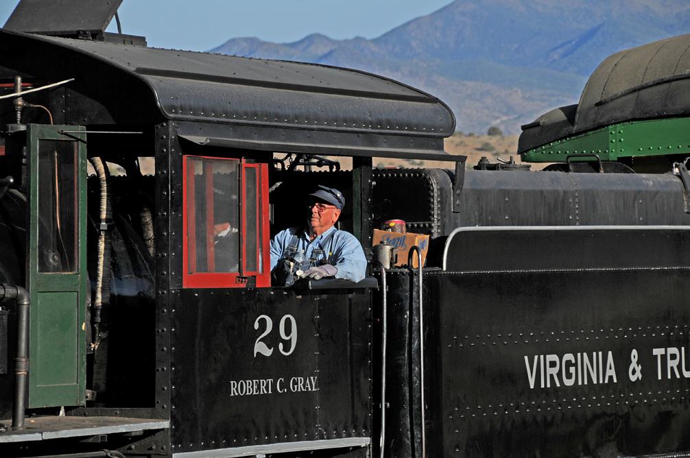 DSC_2879xRP